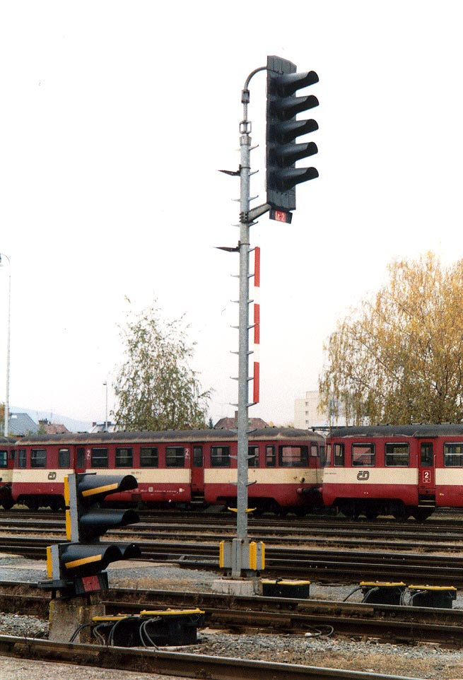 Světelná návěstidla AŽD70 v žst. Šumperk